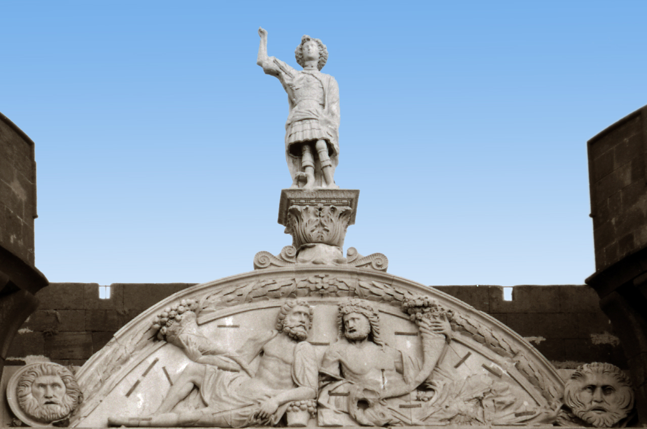 Servizio fotografico : Napoli, 1965 / Paolo Monti. - Strisce: 2, Fotogrammi complessivi: 6 : Negativo b/n, gelatina bromuro d'argento/ pellicola ; 35 mm. - ((I fotogrammi hanno una doppia numerazione. - Sul portanegativi: Minolta 300mm ISS. - Occasione: Pubblicazione: "Emilio CECCHI, Natalino SAPEGNO (a cura di), Storia della Letteratura Italiana, 9 voll., Milano, Garzanti, 1966 e segg."